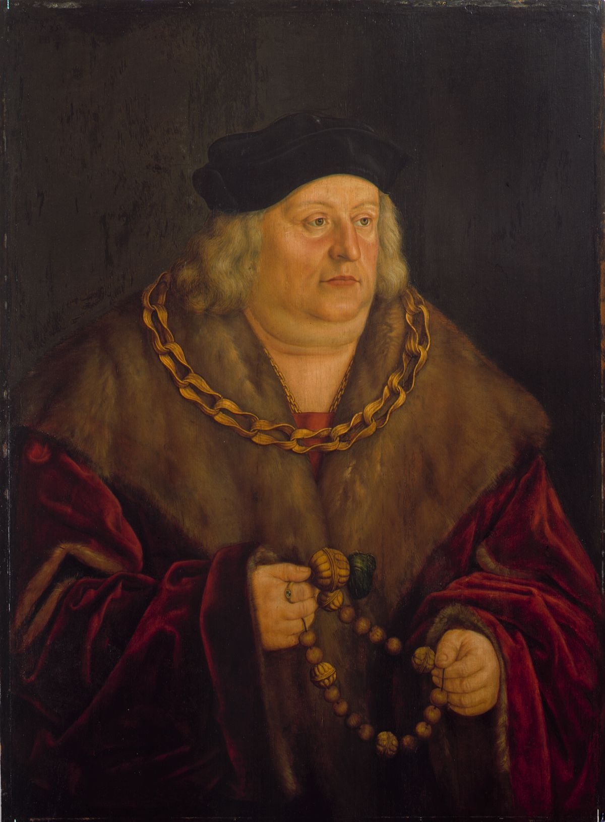 leicht nach rechts gedreht, mit roter pelzverbrämter Schaube über rotem Wams, mit schwerer Hobelspannkette auf dem Pelzkragen und mit einer goldenen Kette darunter sichtbar, mit schwarzem Barett und Rosenkranz mit Bisamapfel in den Händen.